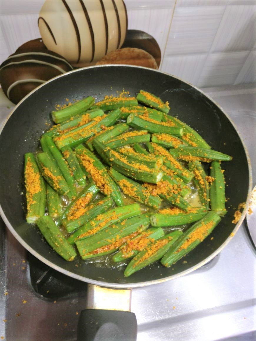 బెండకాయ కాయలుతో వేపుడు